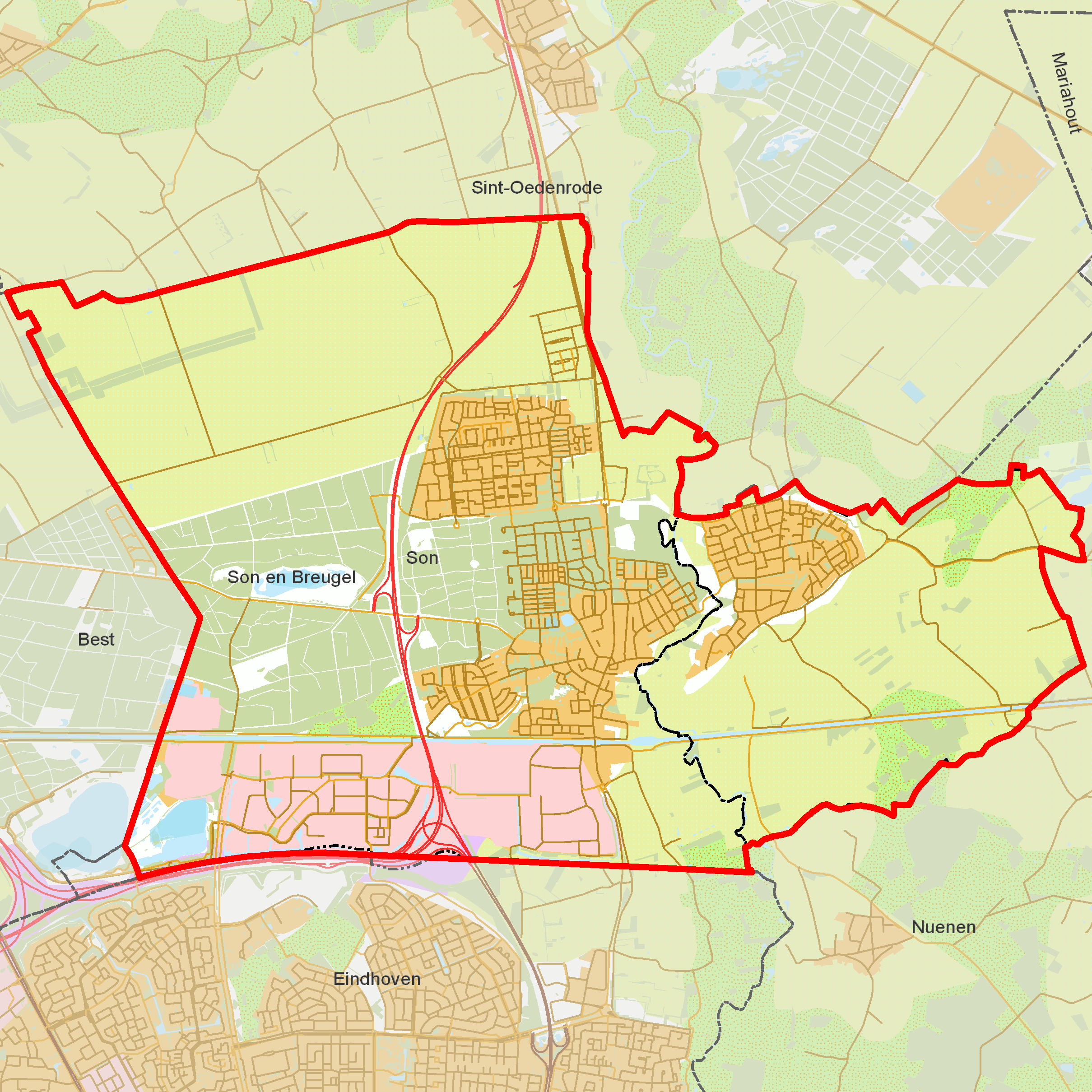 BAG woonplaatsen - Gemeente Son en Breugel.png